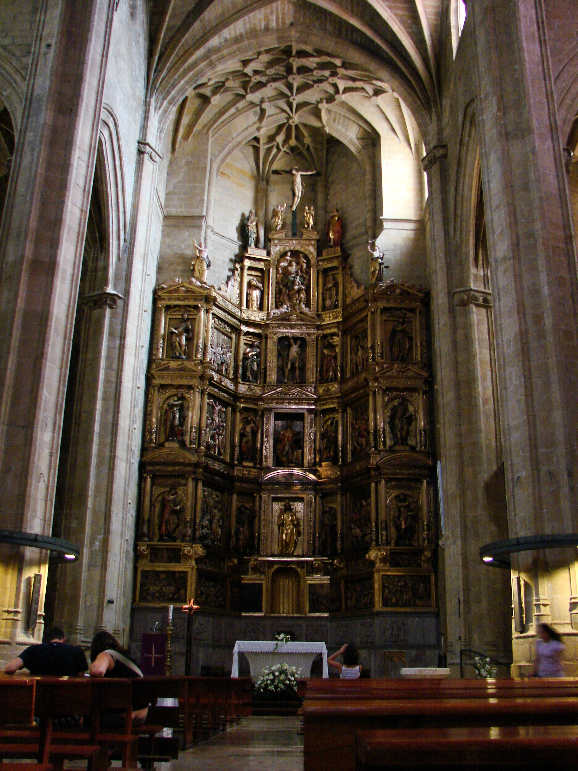 San Sebastián, province de Gipuzkoa (Espagne) : nef et coeur (en fond) de l'église Saint Vincent